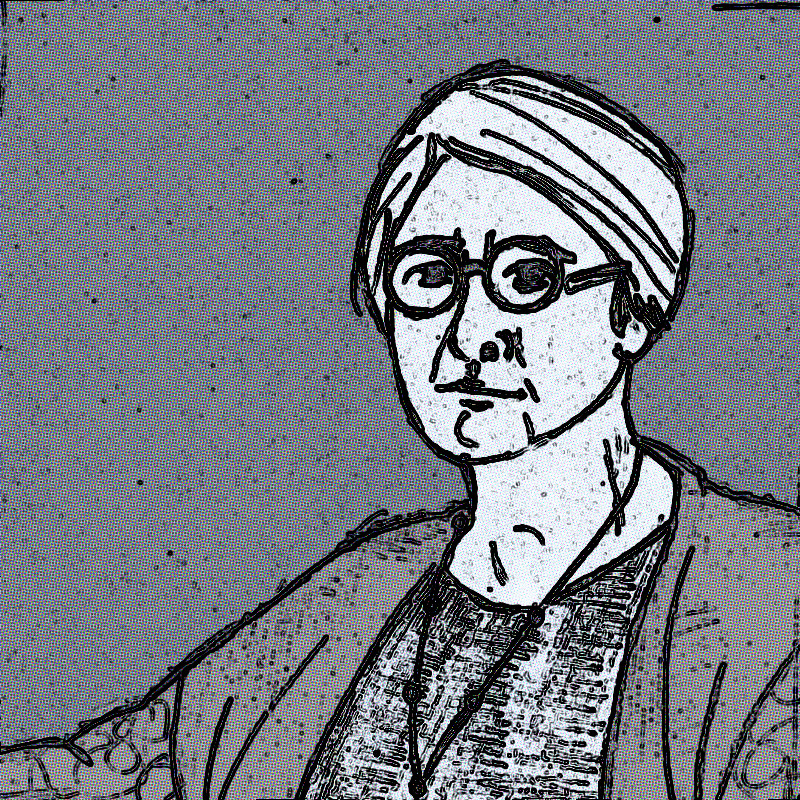 Annie Russell Maunder